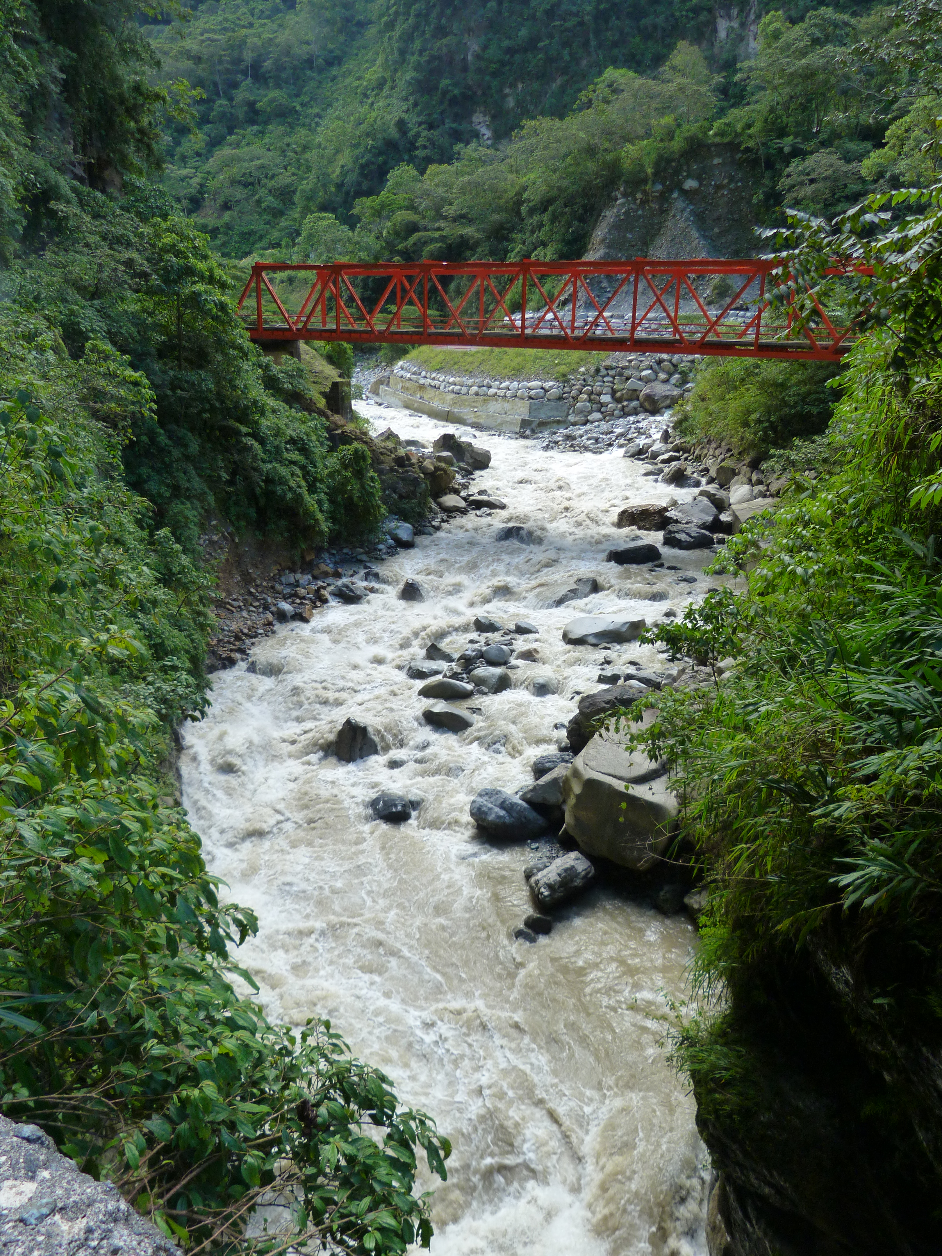 San Ramón